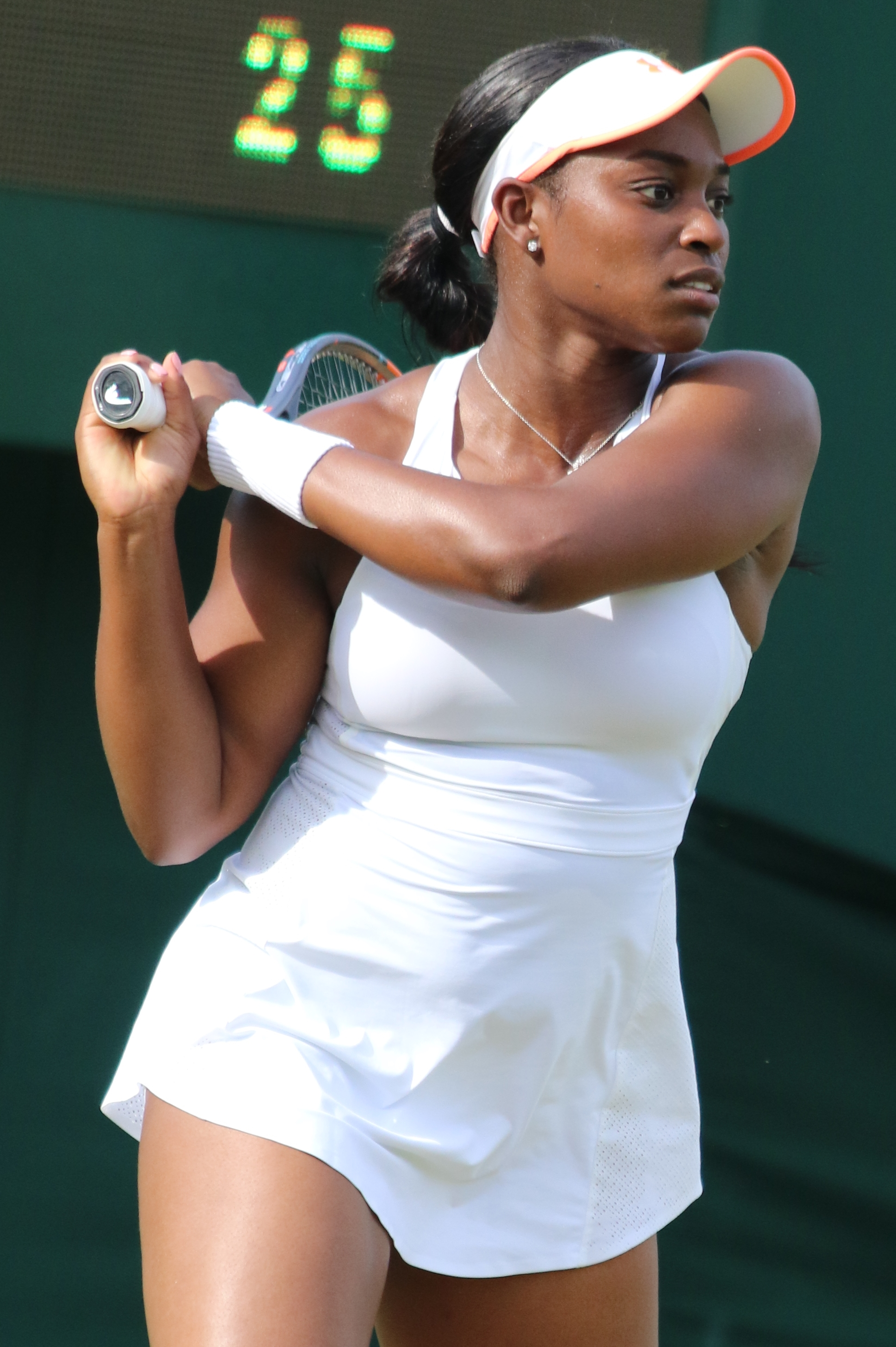 Stephens WM17 (7)